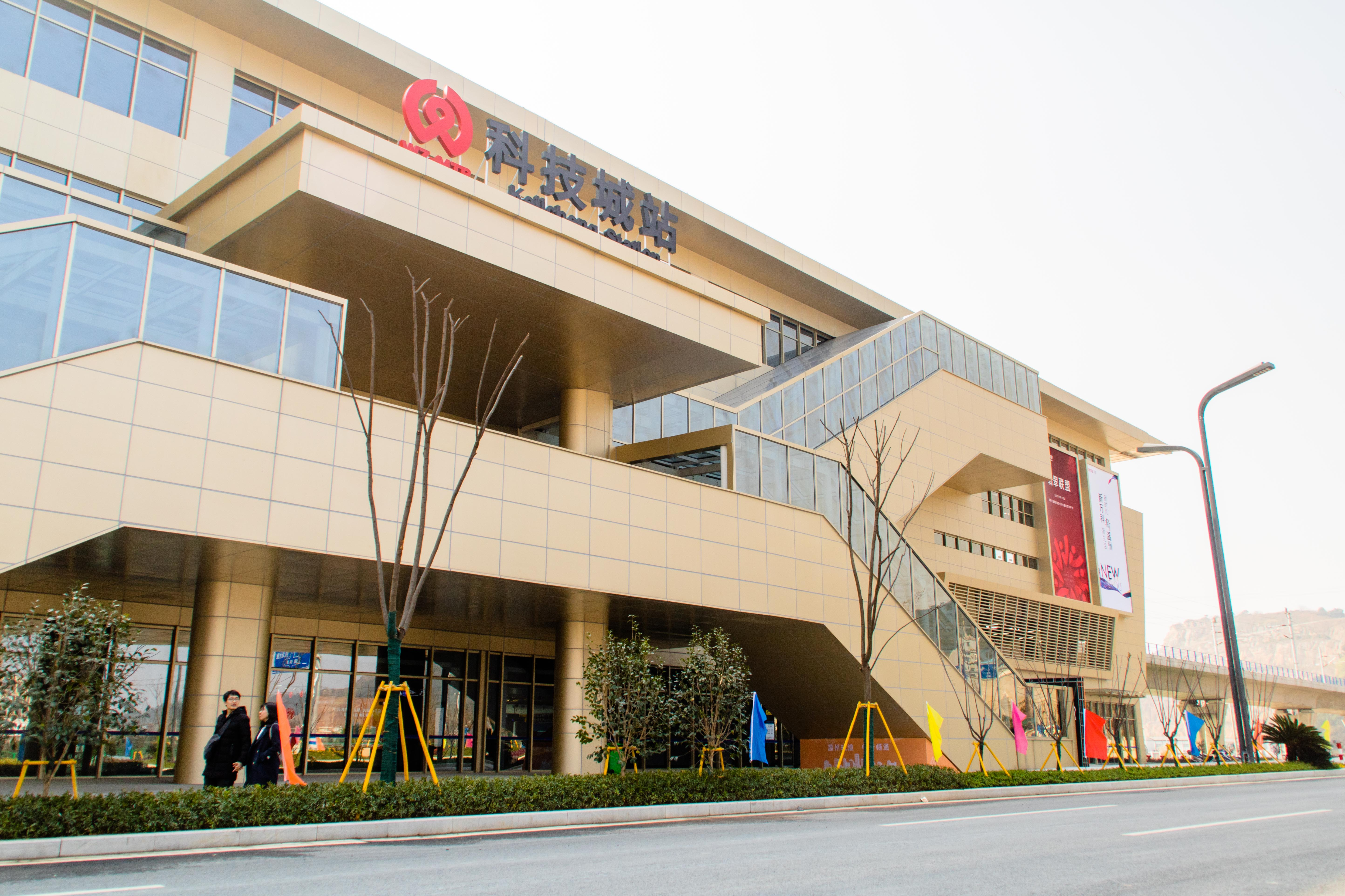 中文（中国大陆）: 科技城站站房